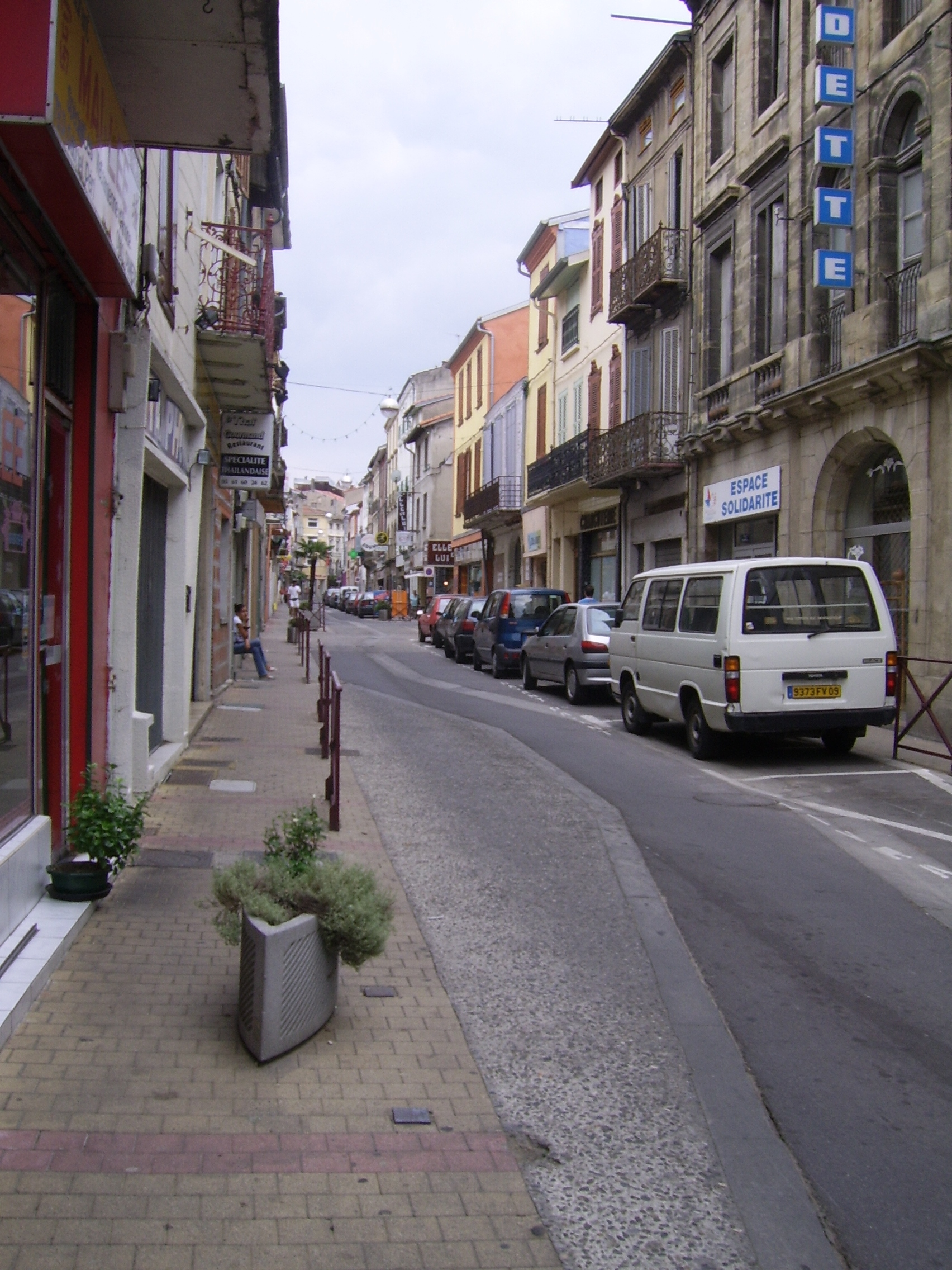 Pamiers (Ariège, Midi-Pyrénées, France) : Une rue du centre ville.